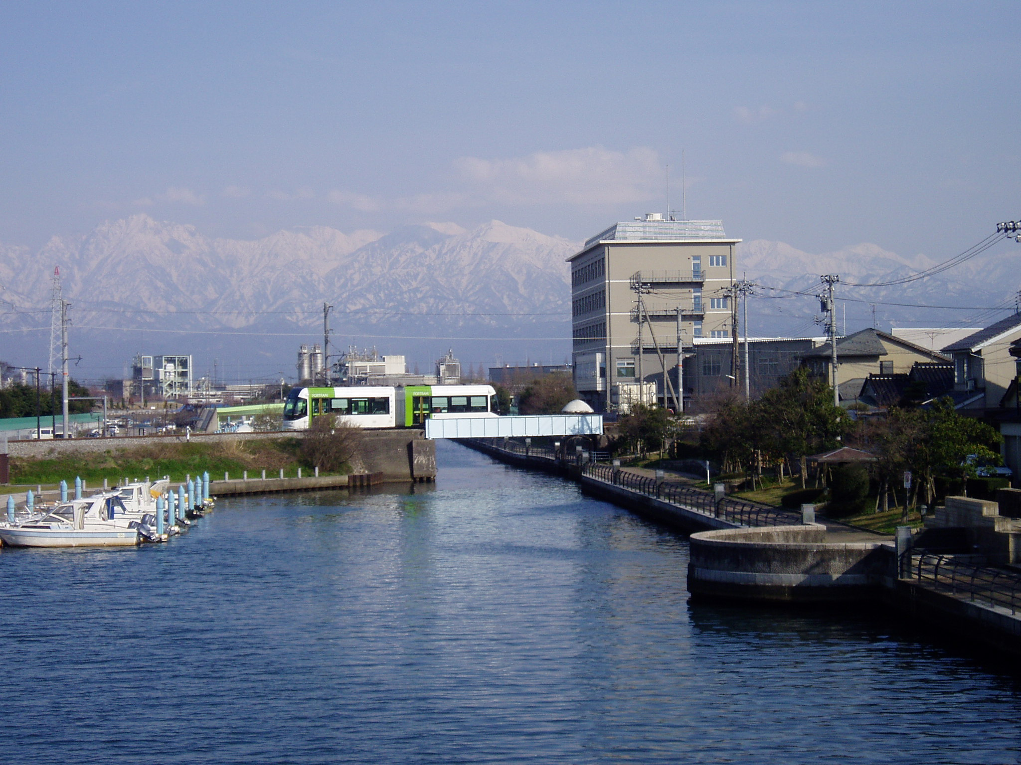 富山ライトレールの車両と岩瀬運河と立山連峰